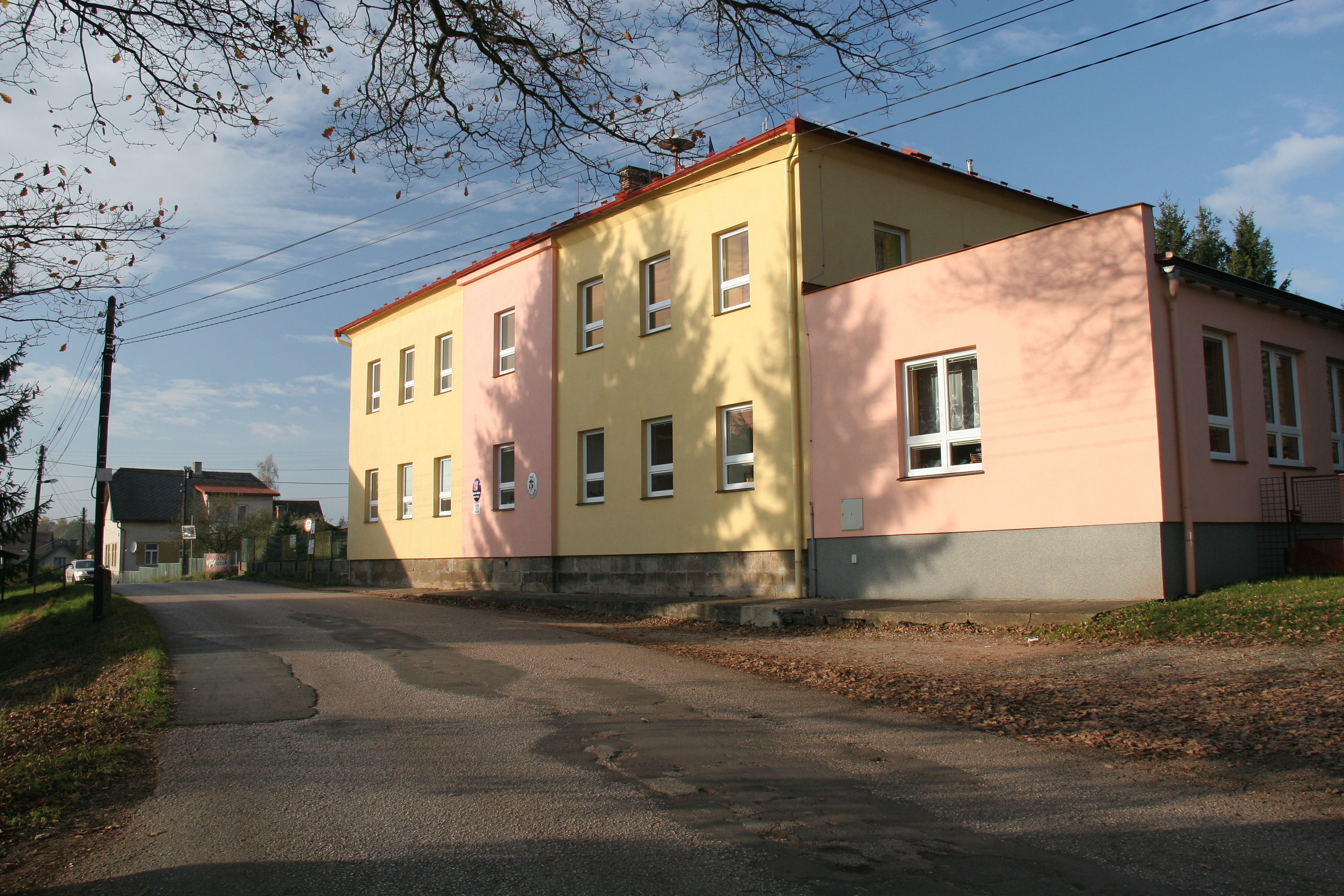 Borovnice obecní úřad